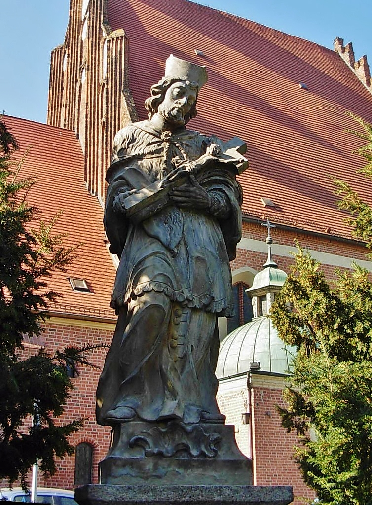 Rzeźba św. Jana Nepomucena przy katedrze w Bydgoszczy (poł. XVIII wieku)